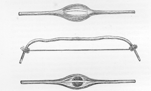 Dinka shields